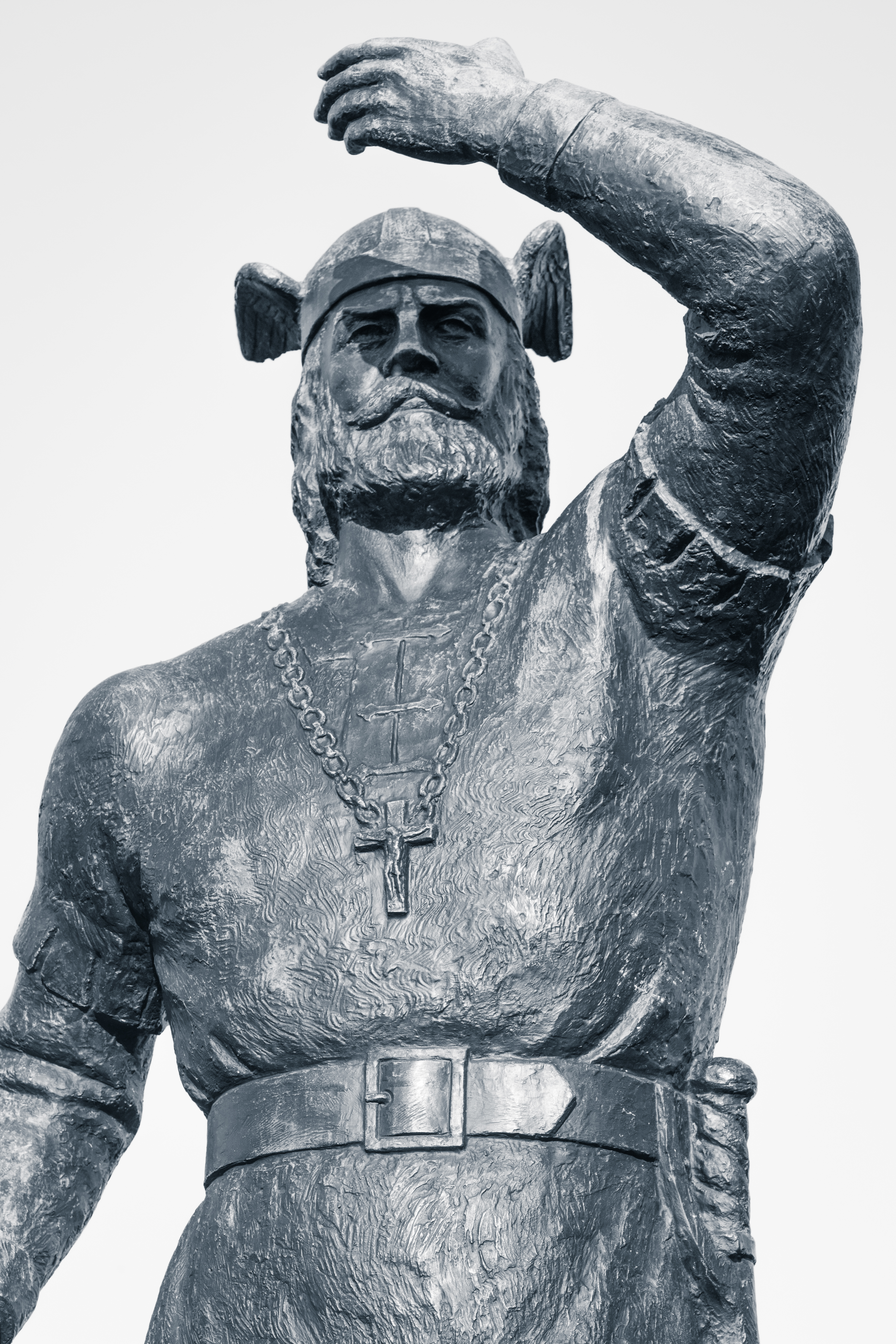 Leif Erikson Statue, Duluth